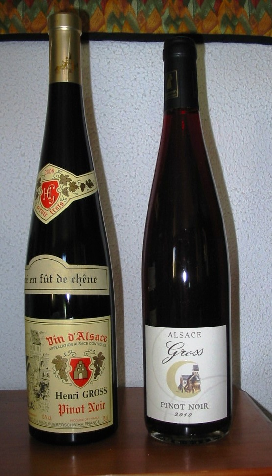 Bouteille de pinot noir de cher Gross à Gueberschwihr